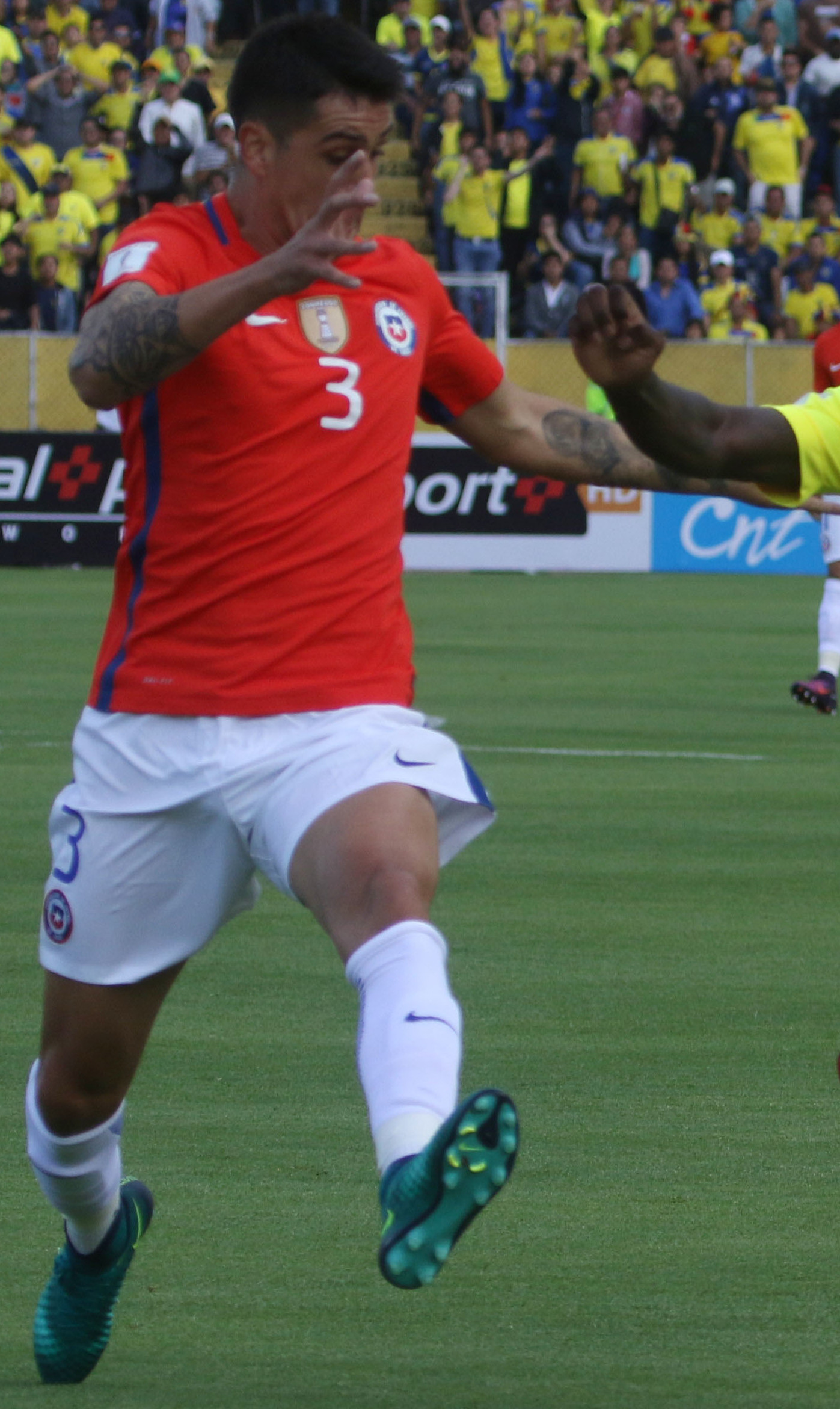 Quito, 6 oct (Andes).- Ecuador (amarillo) volvió a mostrar la imagen que lo llevó a ganar los primeros cuatro partidos en seguidilla de las Eliminatorias al Mundial Rusia 2018 y con algunas variantes se impuso por 3-0 a Chile en el estadio Olímpico Atahualpa de Quito.ANDES/Micaela Ayala V.